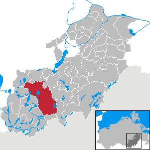 Neustrelitz in Mecklenburg-Vorpommern, Landkreis Mecklenburg-Strelitz